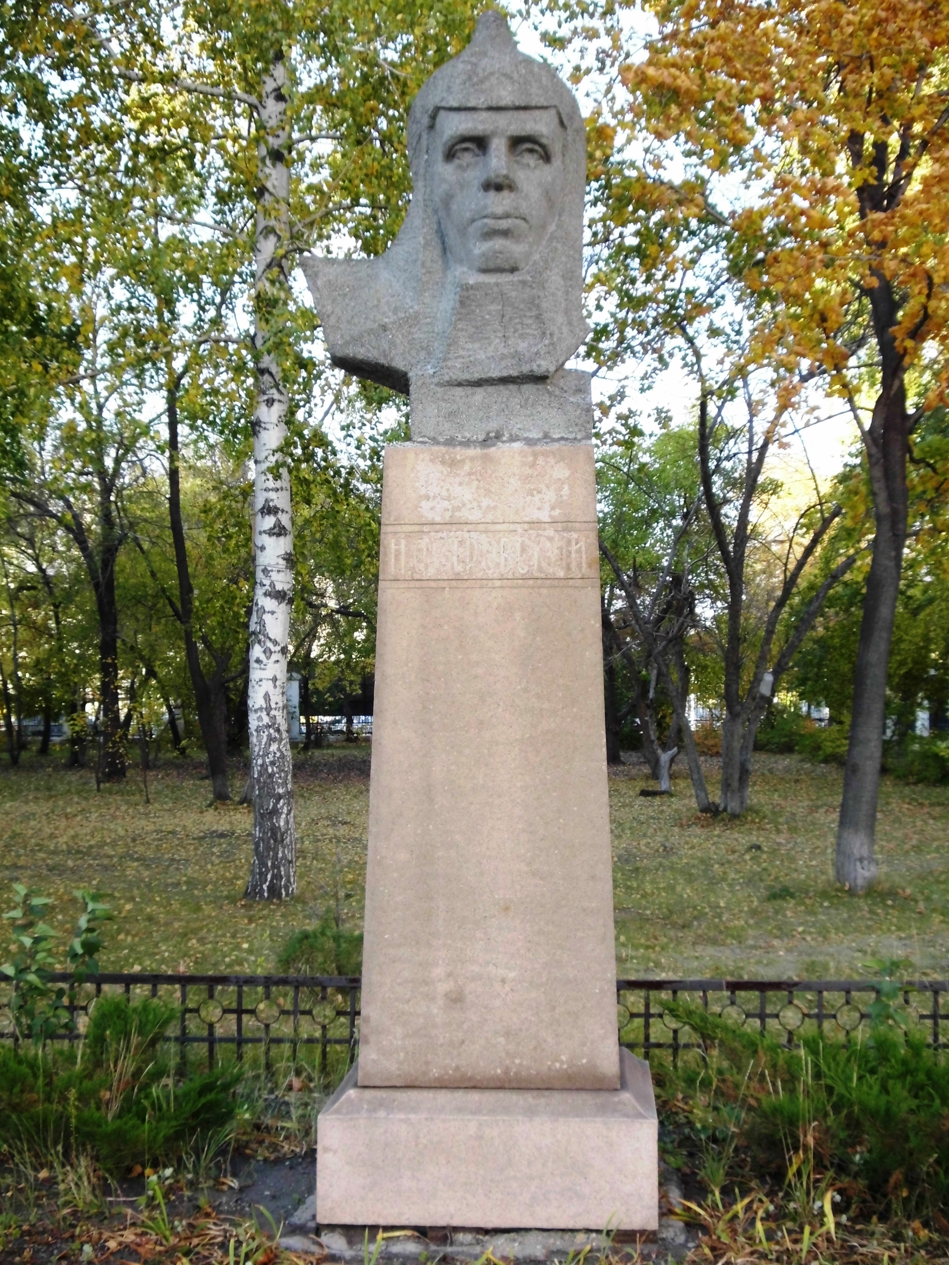 Здание, в котором формировалась 97-я танковая бригада в 1942 году: проспект Ленина, 13 (справа от Комсомольской площади, ныне размещается гимназия № 48), Челябинск, Челябинская область. Памятник Н. А. Островскому во дворе (гимназия его имени).